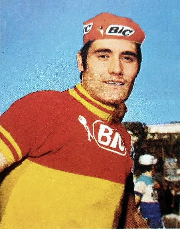 Luis Ocana en 1973 - Campioni dello Sport 1973-1974, n°140